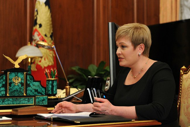 Марина Ковтун на рабочей встрече с Владимиром Путиным